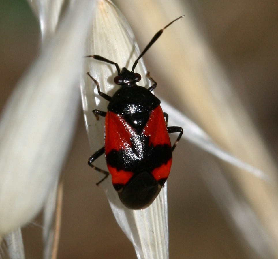 Argaka, Cyprus